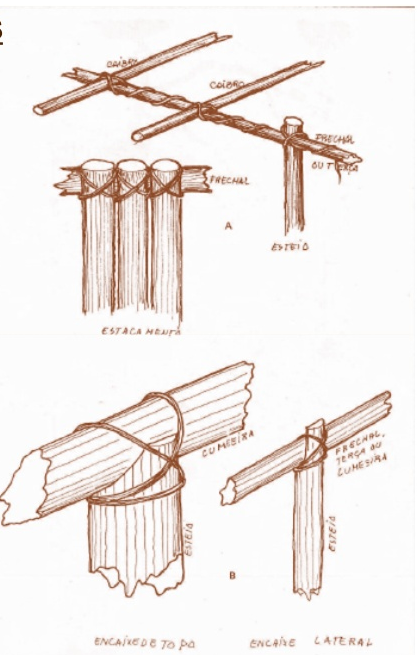 Amarração e encaixe tecnica indigena